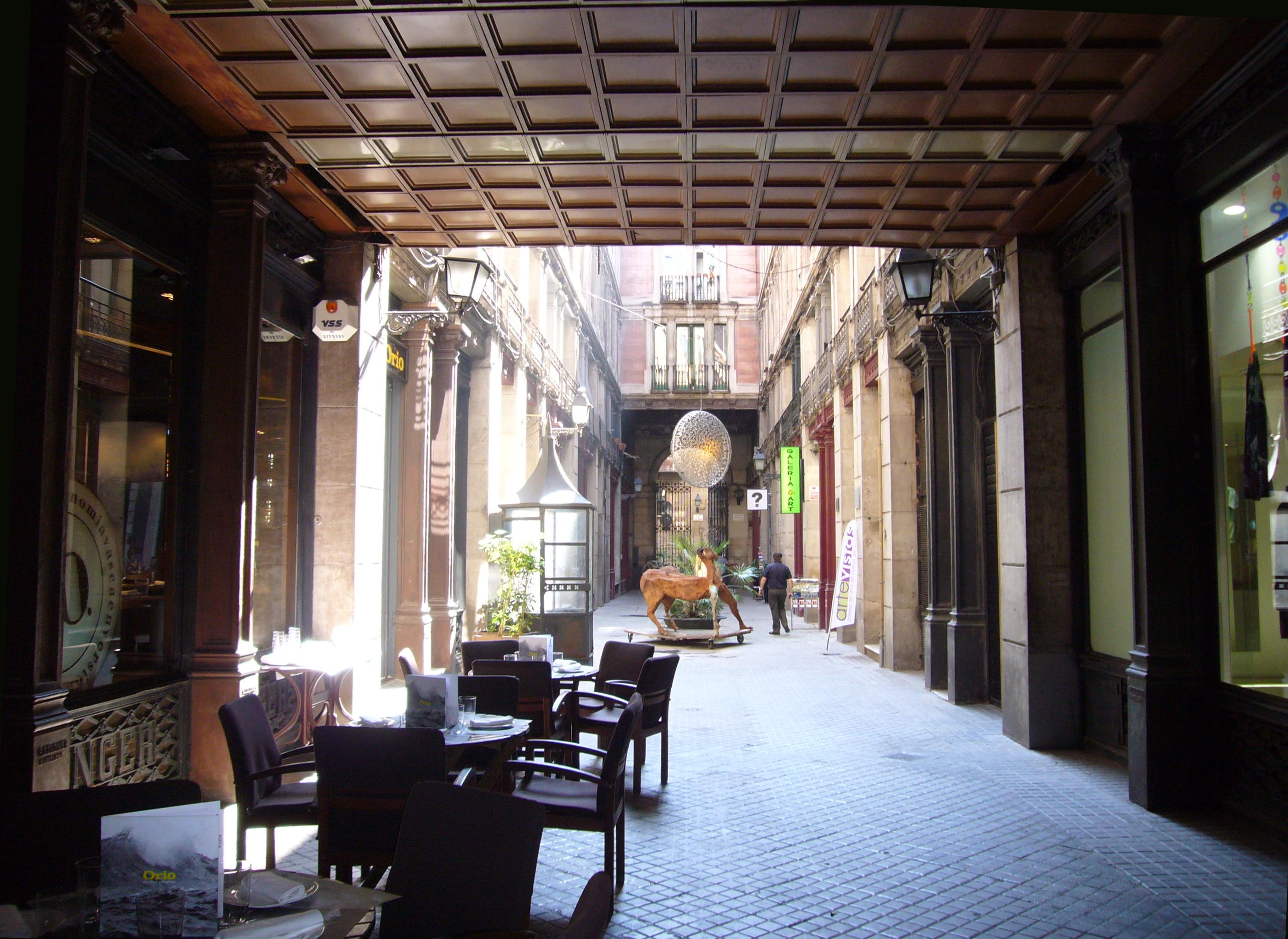 Barcelona, passatge in carrer da Ferran